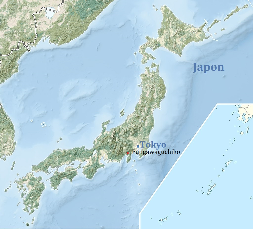 Emplacement de la ville de Fujigawaguchiko, district de Minamitsuru, Préfecture de Yamanashi, sur la carte du Japon